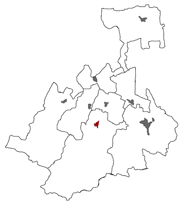 Расположение города Алагир на карте Северной Осетии.